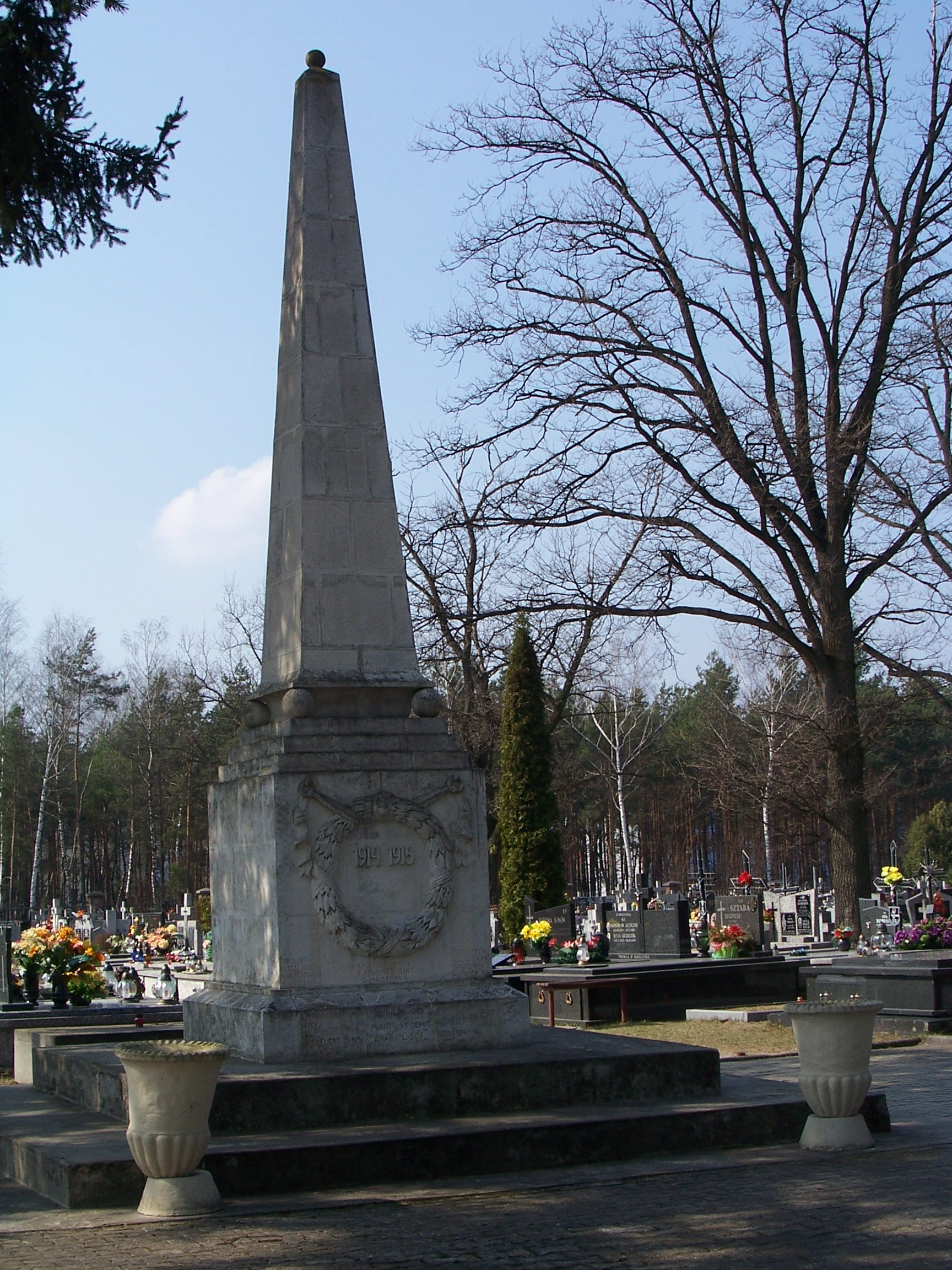 Pomnik poległych w bitwie rudnickiej 1914-1915